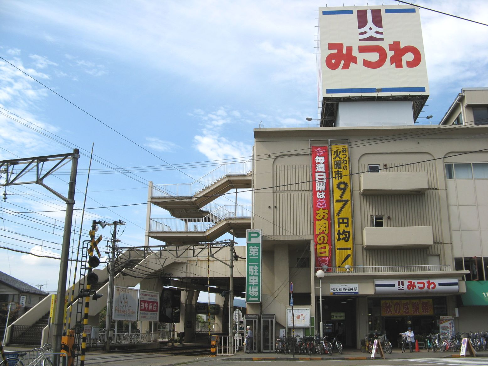 福大前西福井駅 駅ビル